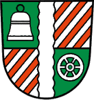 Wappen der ehemaligen Gemeinde Biberau